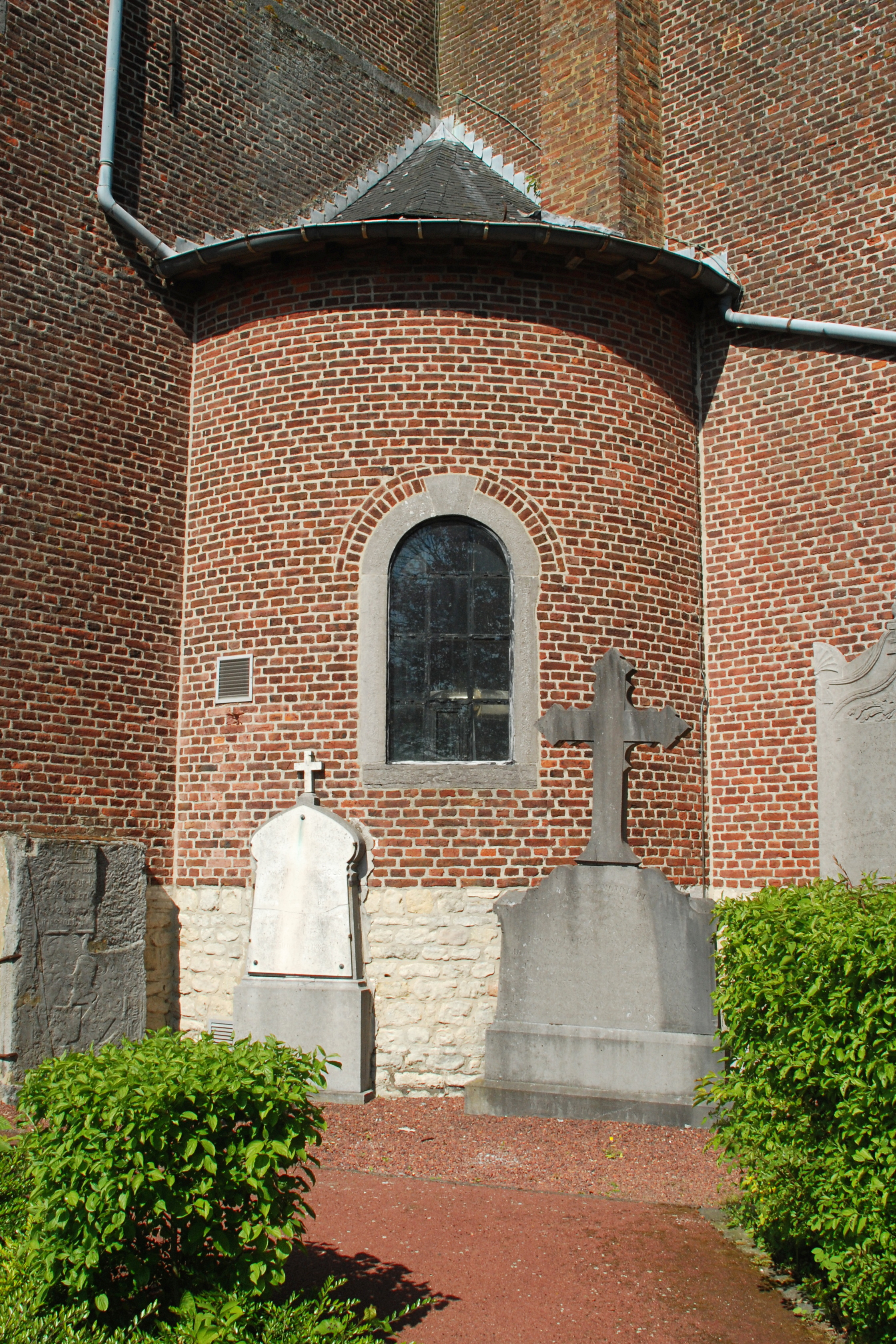 Belgique - Brabant wallon - Mont-Saint-Guibert - Église Saint-Pierre de Corbais (classique, 1773)